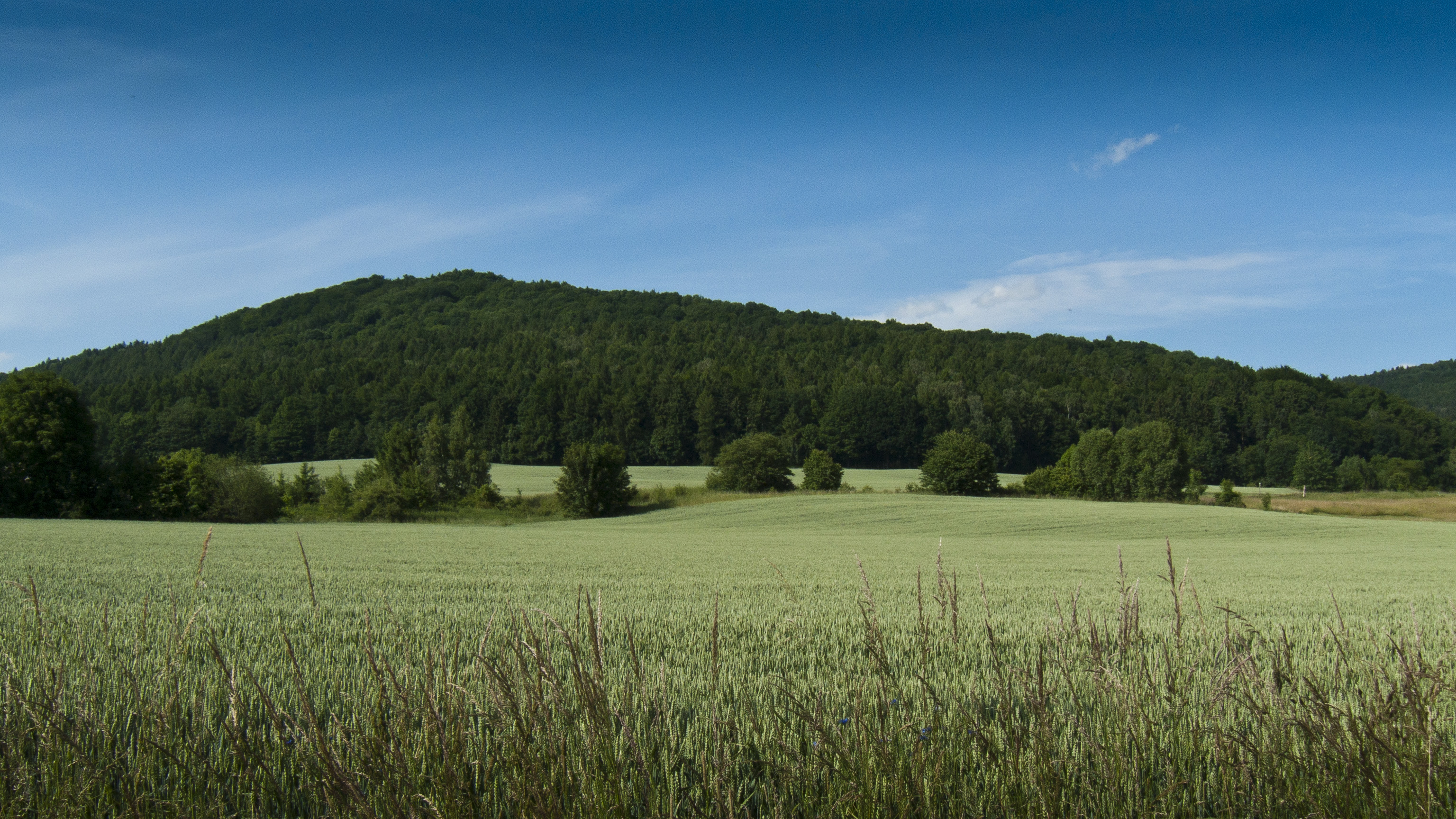 PP Cidlinský hřeben. Pohled na oblast z jihu od vsi Dolní Kněžnice.